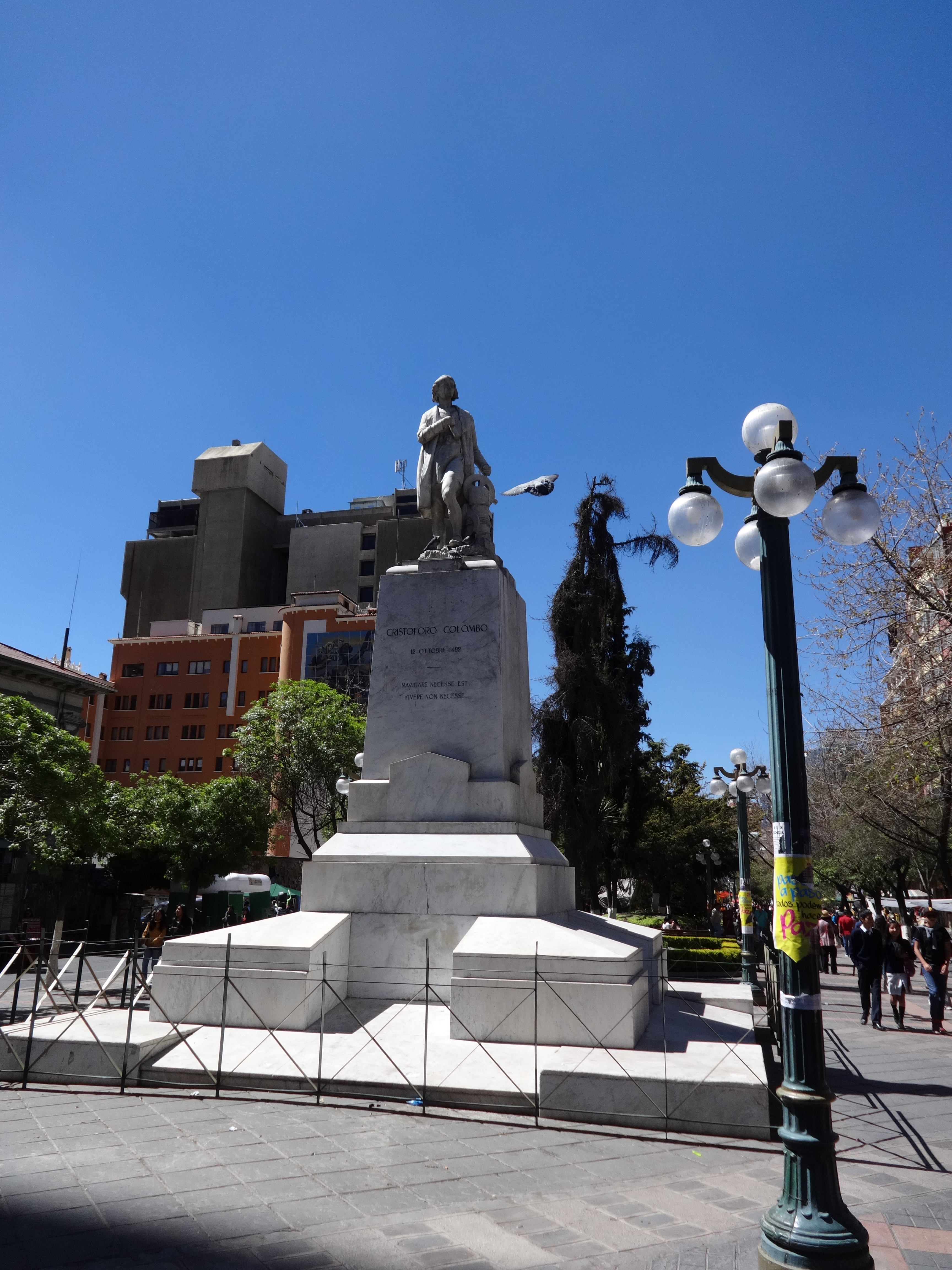 Cristoforo Colombo This medium shows the protected monument with the number L/00-216 in Bolivia.